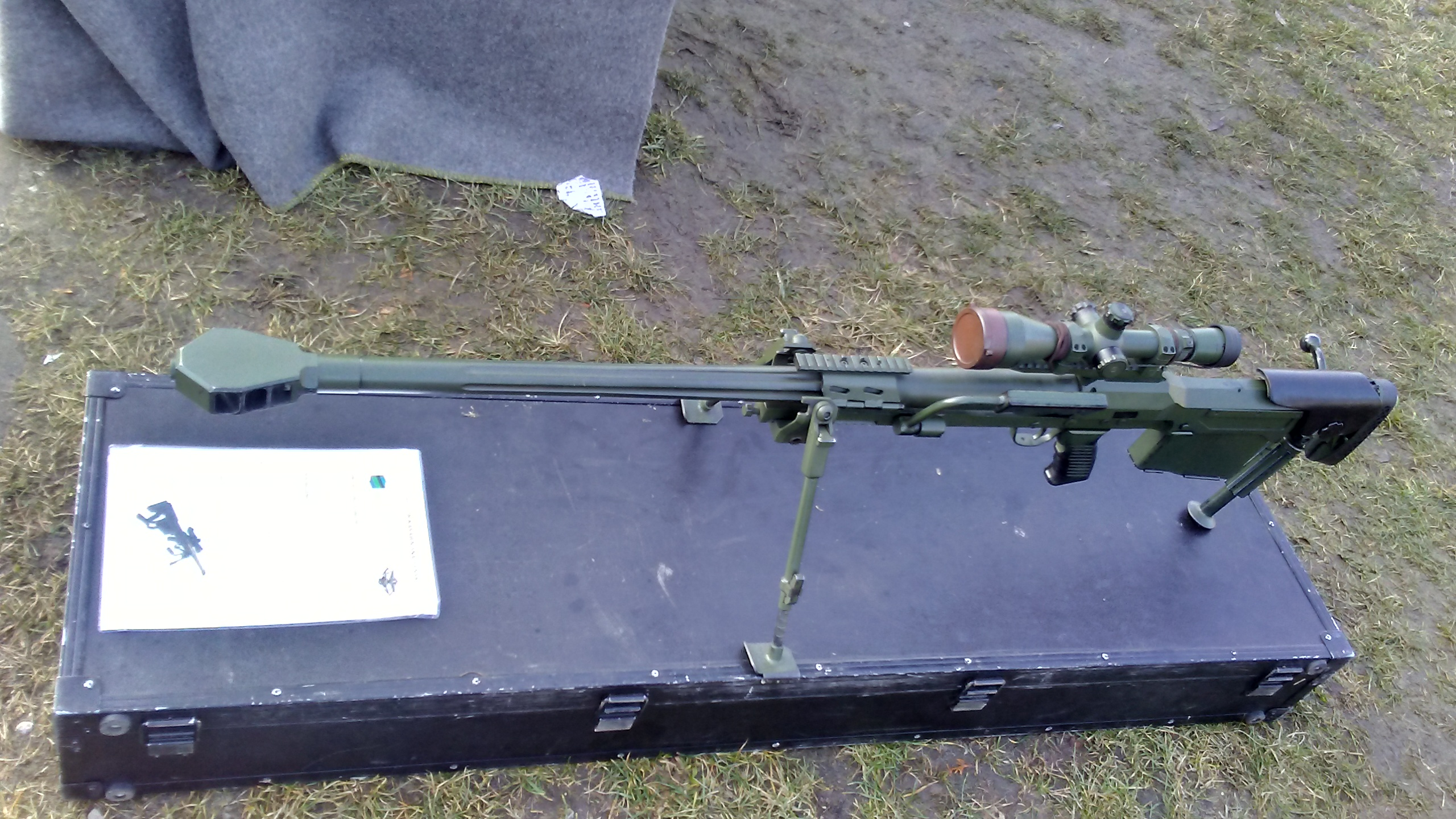 Karabin Tor z Zakładyów Mechanicznych Tarnów S.A. Wyposażenie jednostki w Tomaszowie Mazowieckim